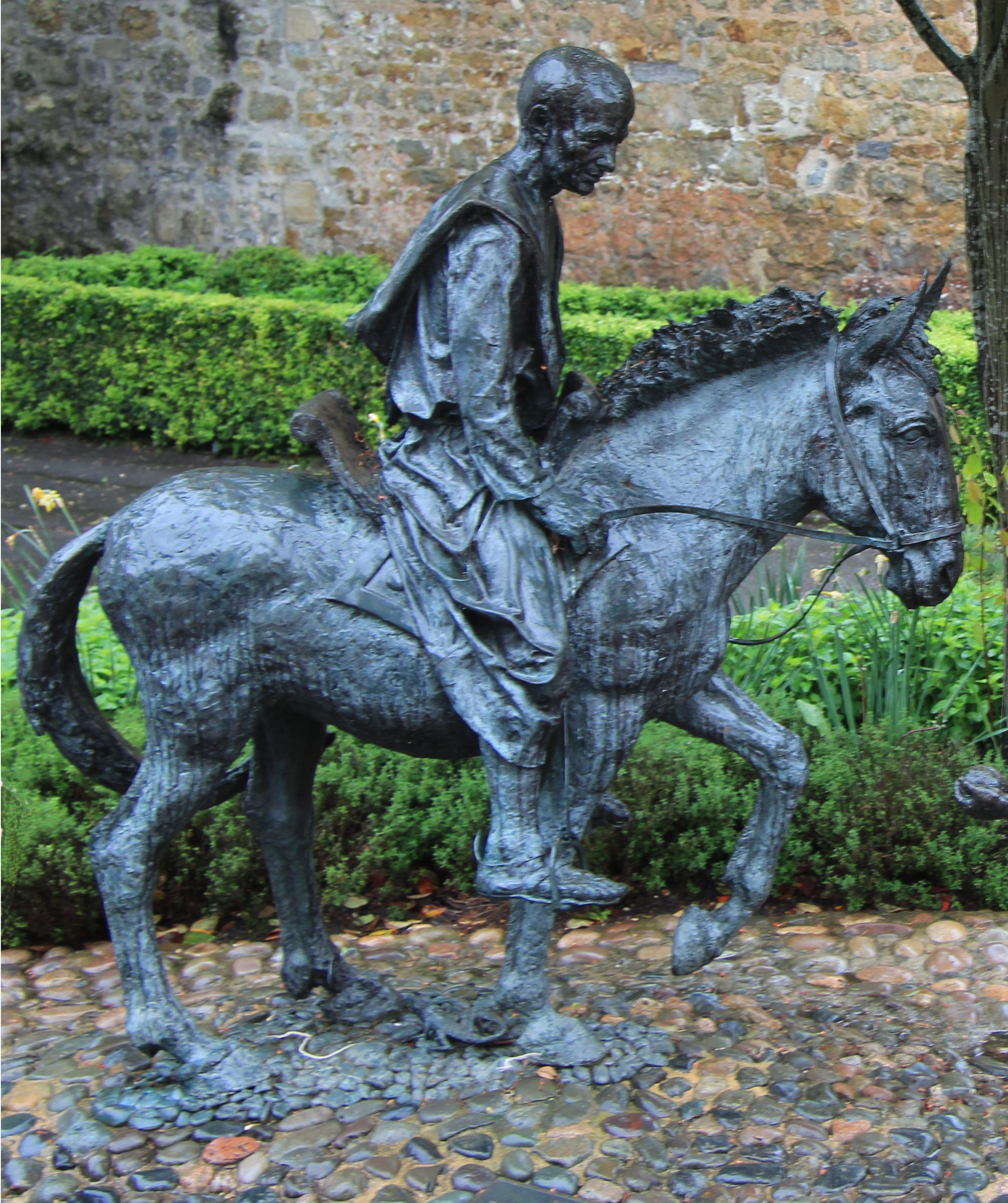 Versión reducida de la imagen original